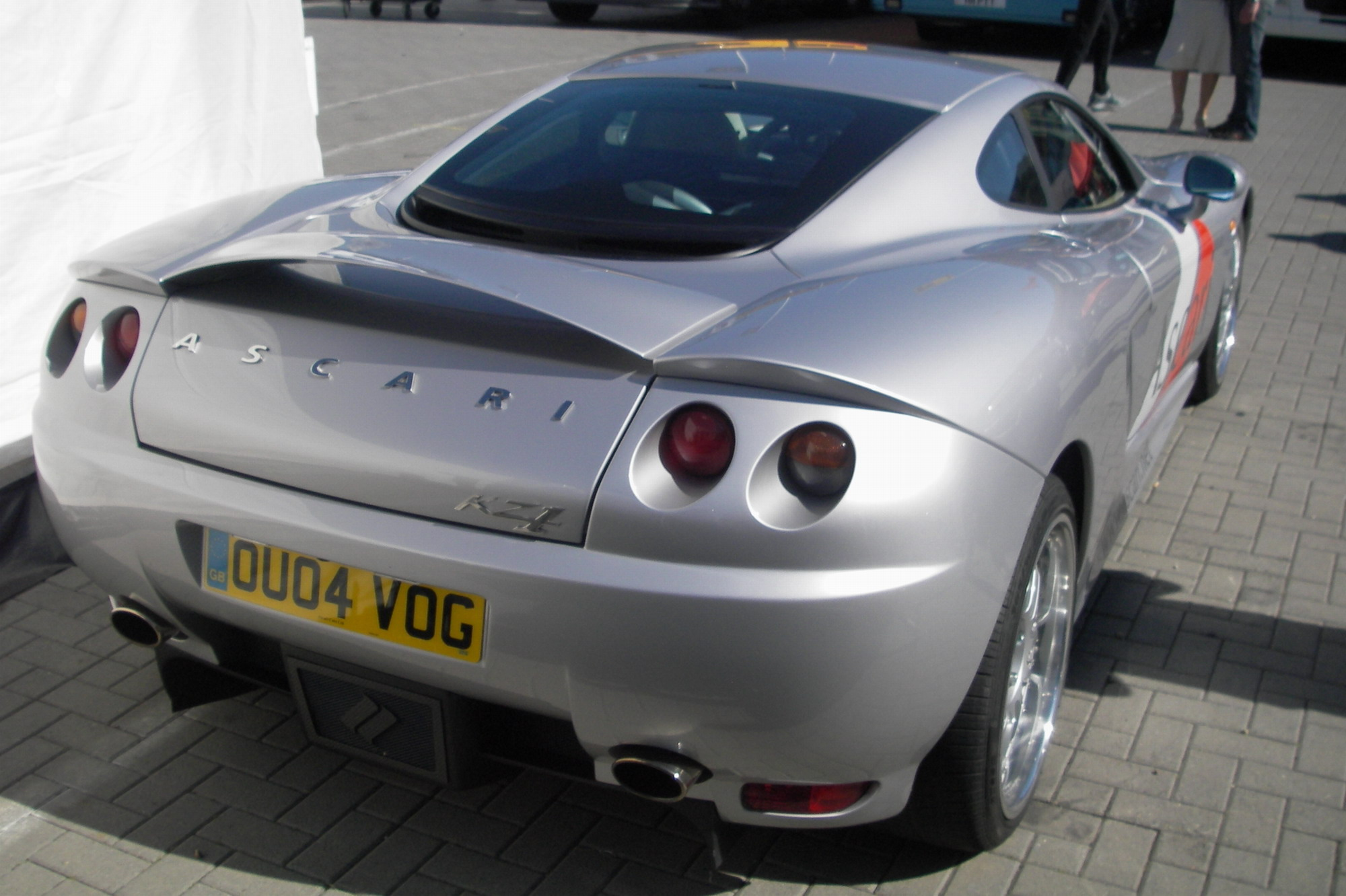 Ascari KZ1